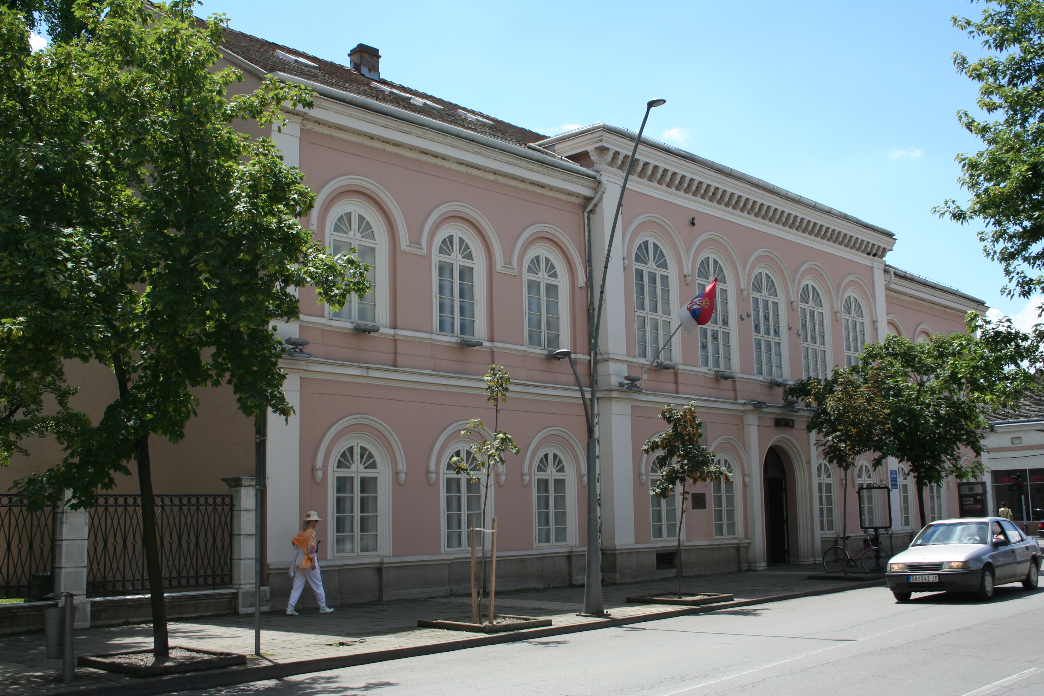 Zgrada Narodnog muzeja (zgrada polugimnazije)